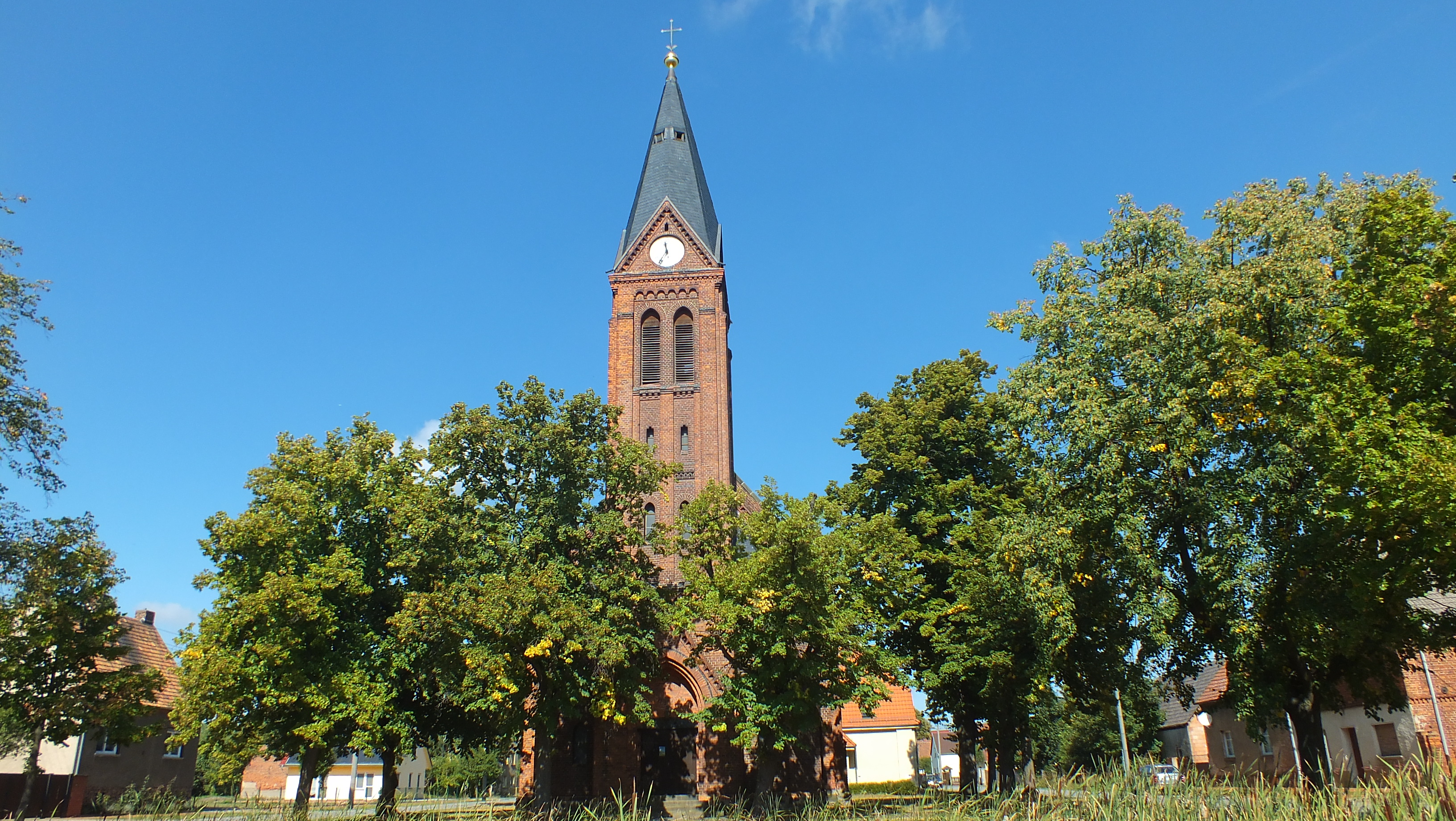 Kirche in Groß Naundorf (Annaburg)